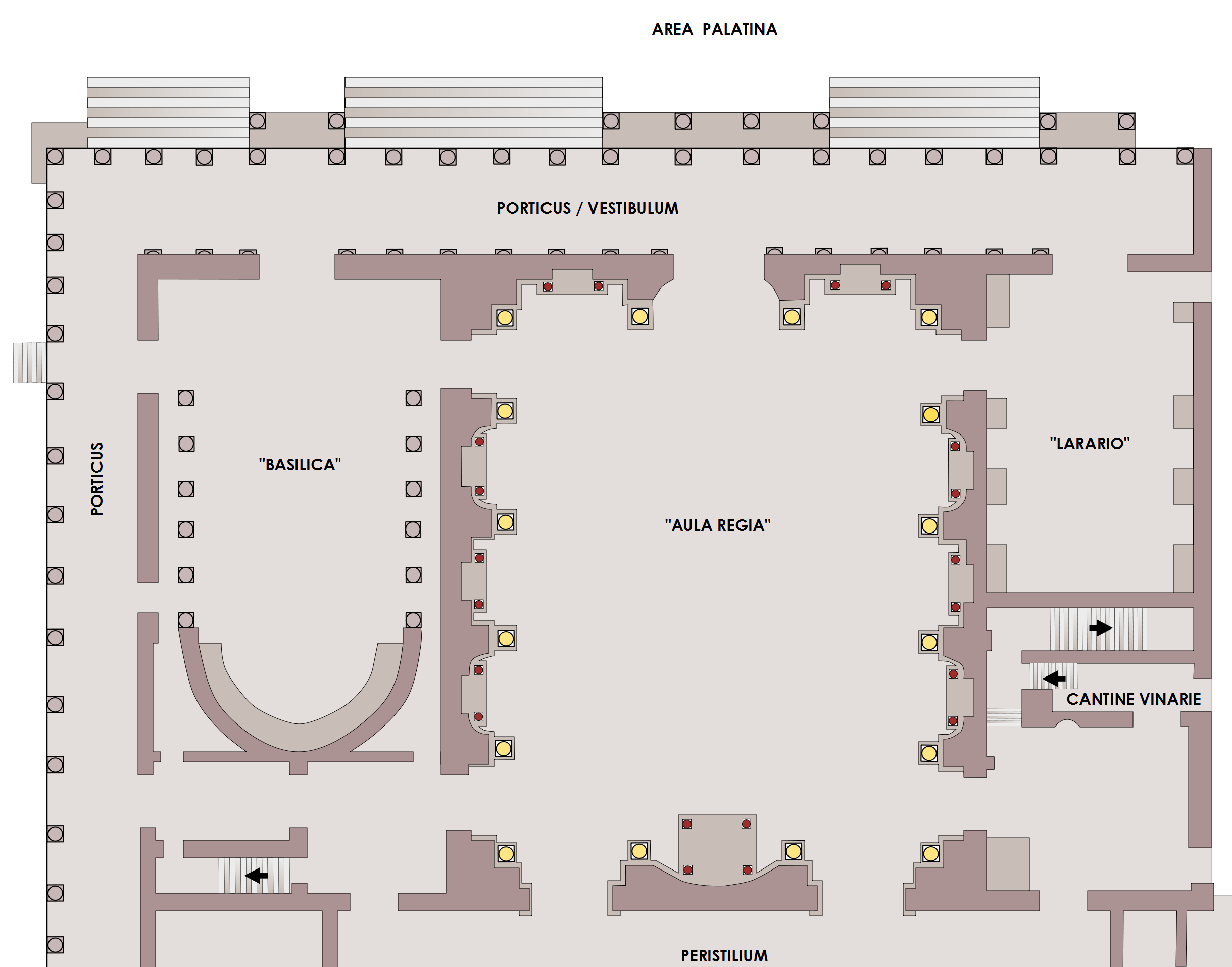 Pianta della parte settentrionale della Domus Flavia di Domiziano (Roma - Palatino; 81-92 AD); architetto Rabirio. Questa parte è stata denominata anche vestibulum